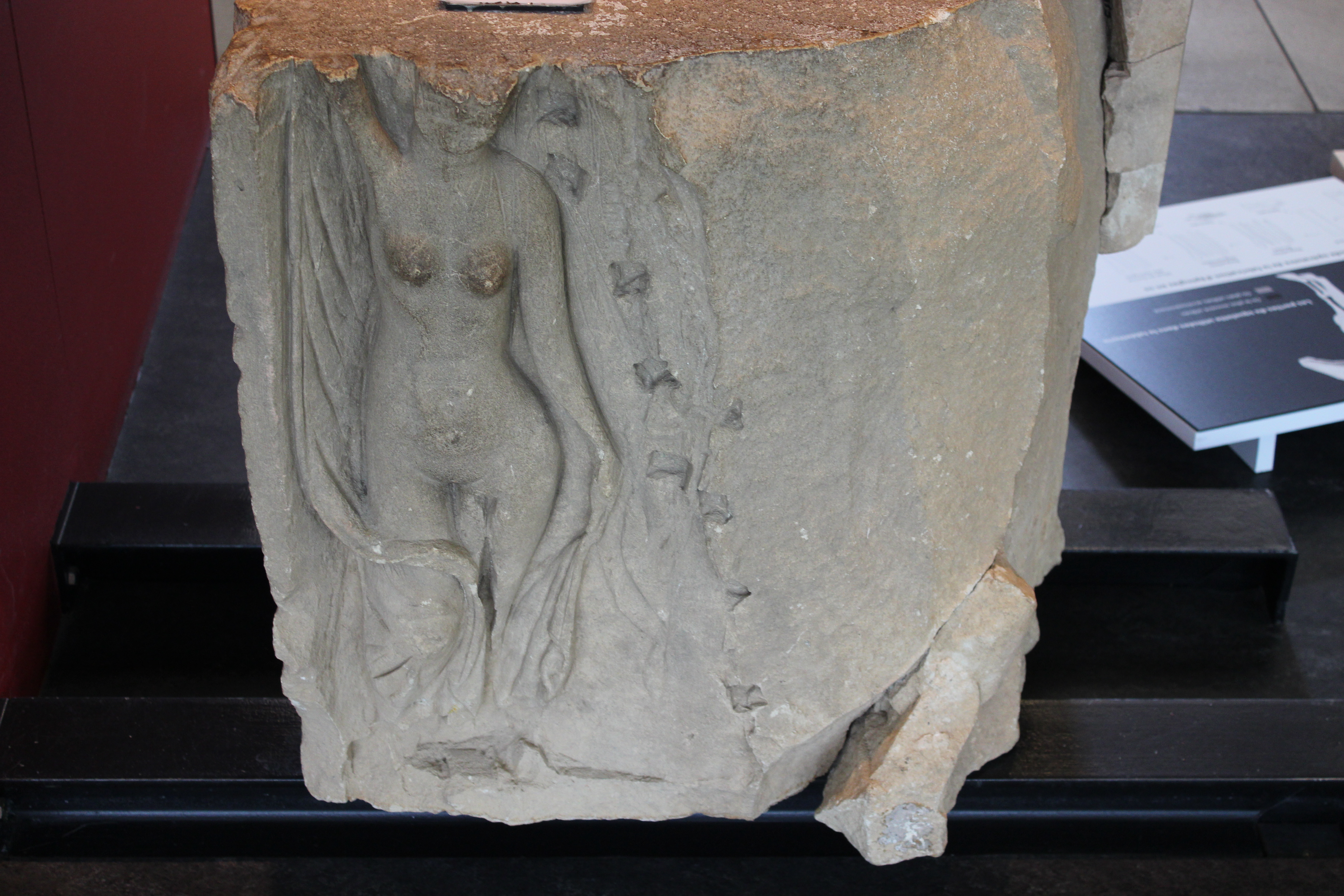 Venus sur une des colonnes de la maison au grand péristyle de Vieux la Romaine (Calvados, Normandie, France).